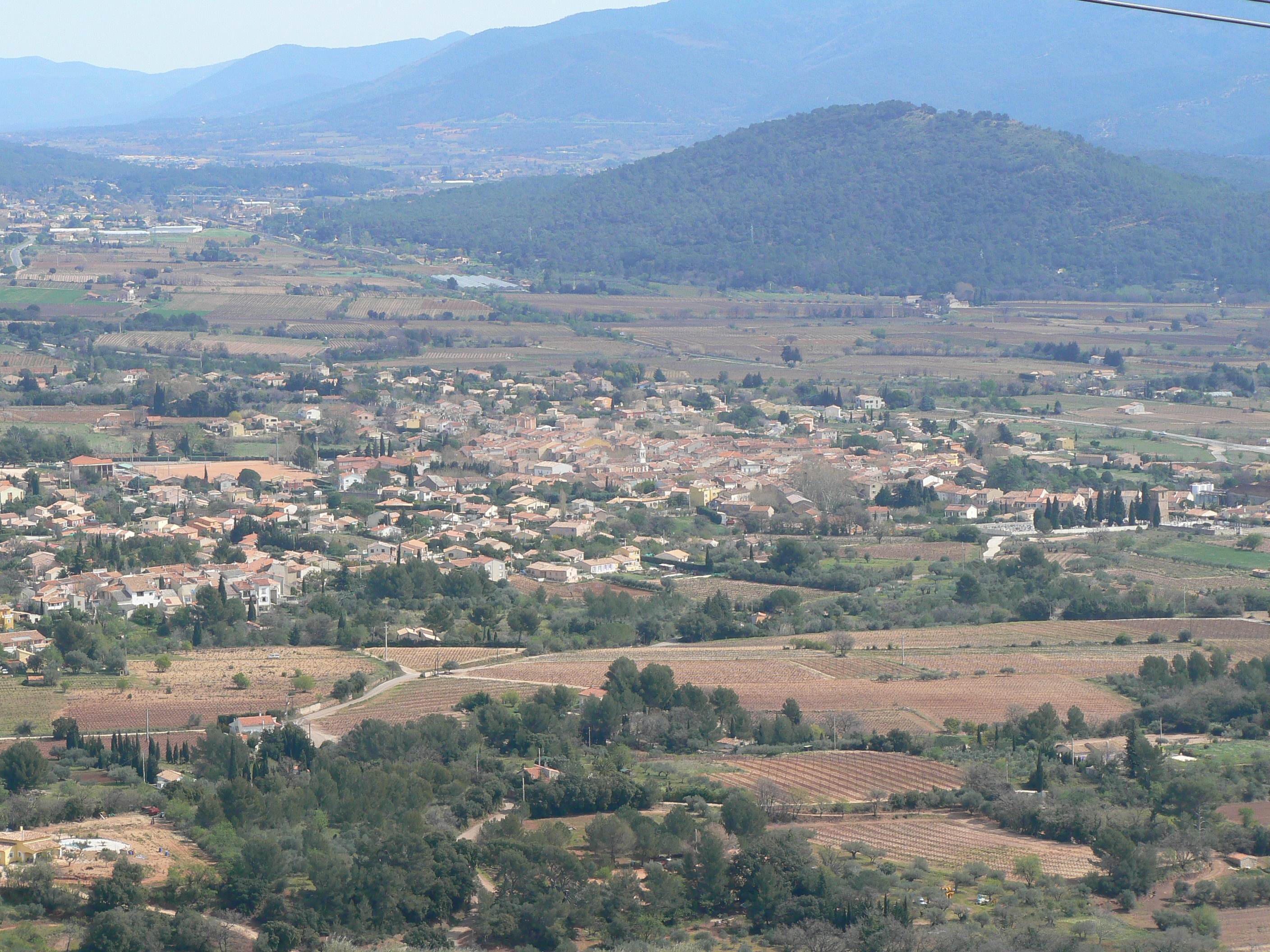 Photo de la commune de Puget-Ville prise dans les hauteurs